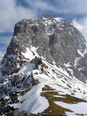 Planjava, fotografirana iz Kamniškega sedla